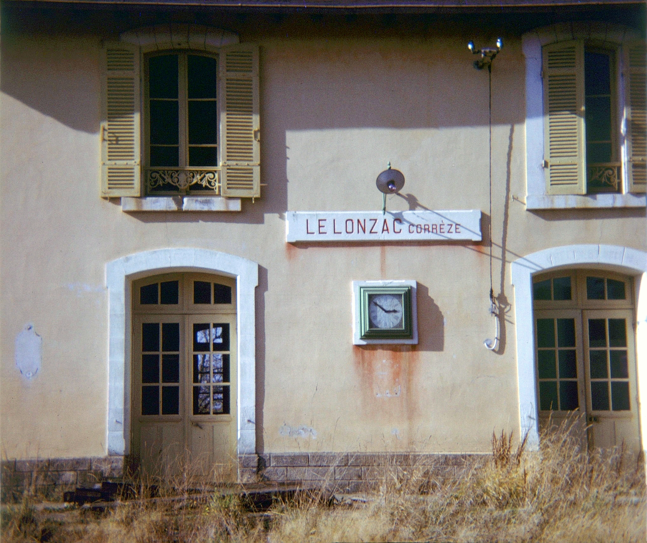 La façade de l'ancienne gare du Lonzac (19) côté quai, le 14 avril 1974.